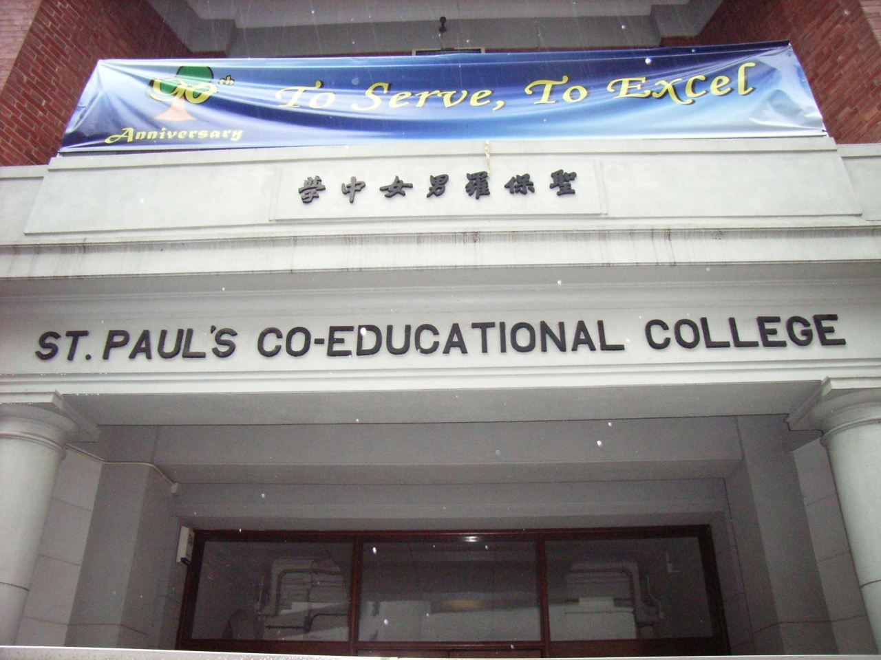 香港名人輩出的聖保羅男女中學 AlbertCotton